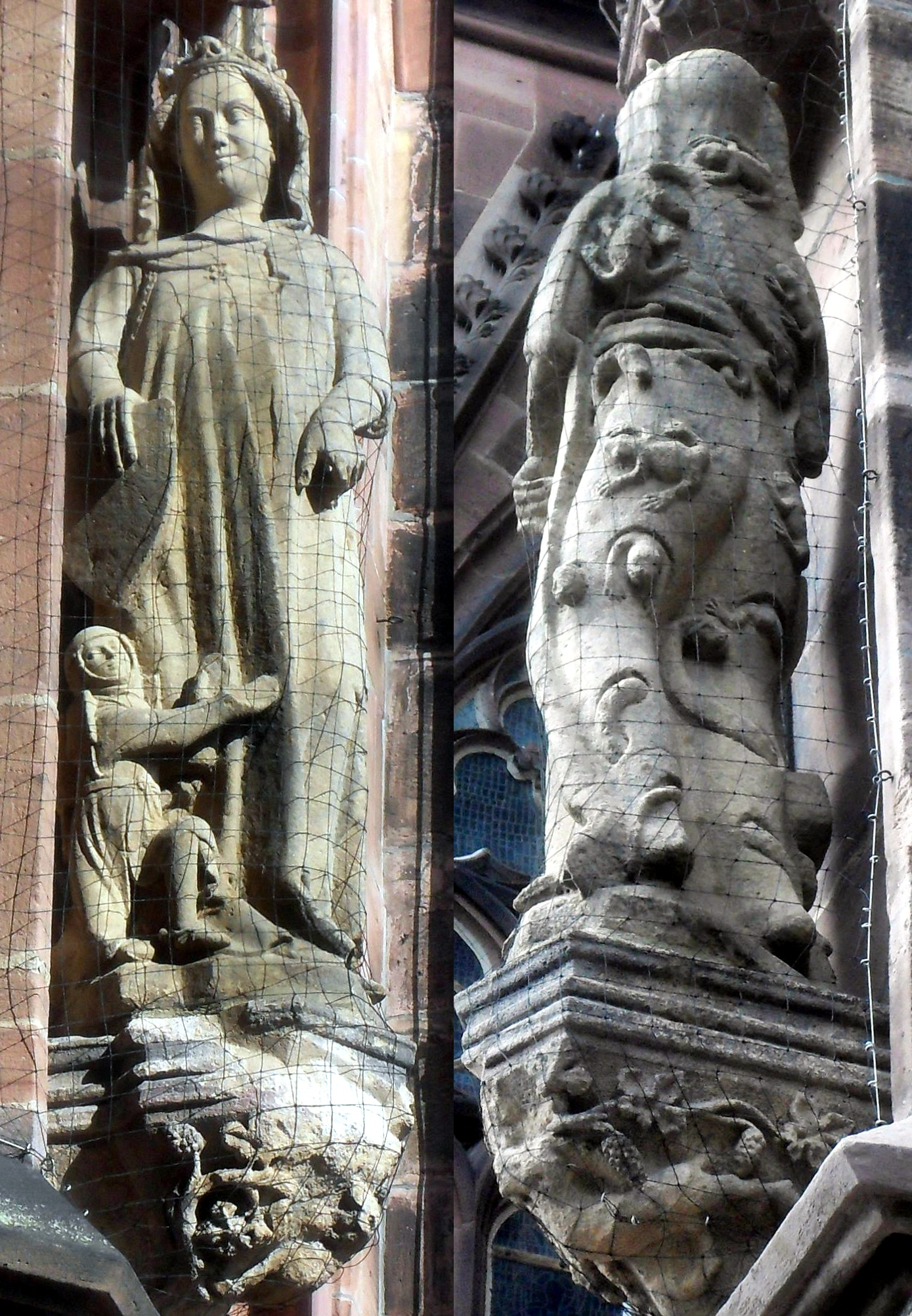 Frau Welt rechts neben dem Südportal des Wormser Doms von vorne und von hinten